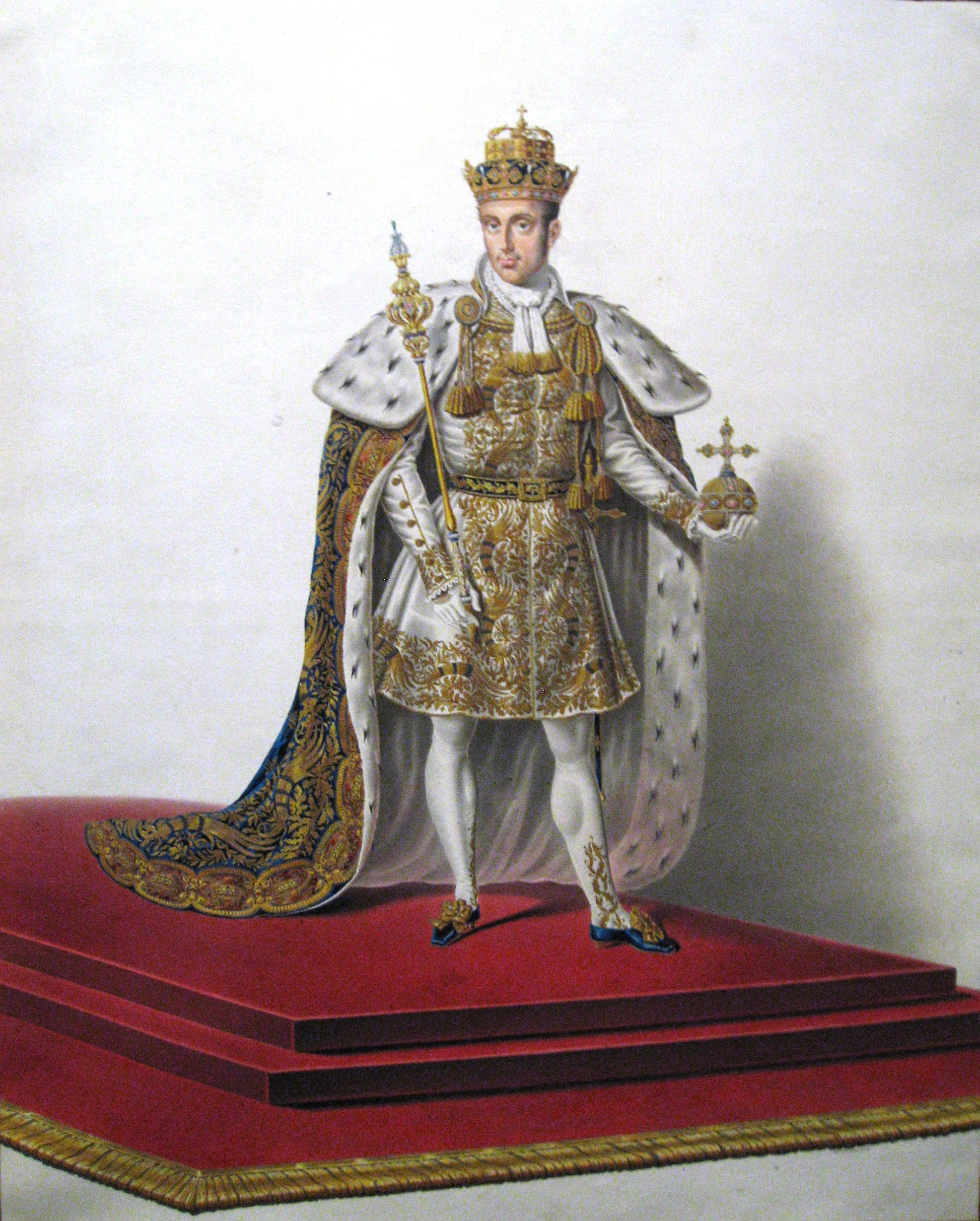 Kaiser Ferdinand I. von Österreich im lombardo-venezischen Krönungsornat mit Hermelinfell. A. Weißenböck; Wien, um 1838. Aquarell. Inv. Nr. XIV B 43.